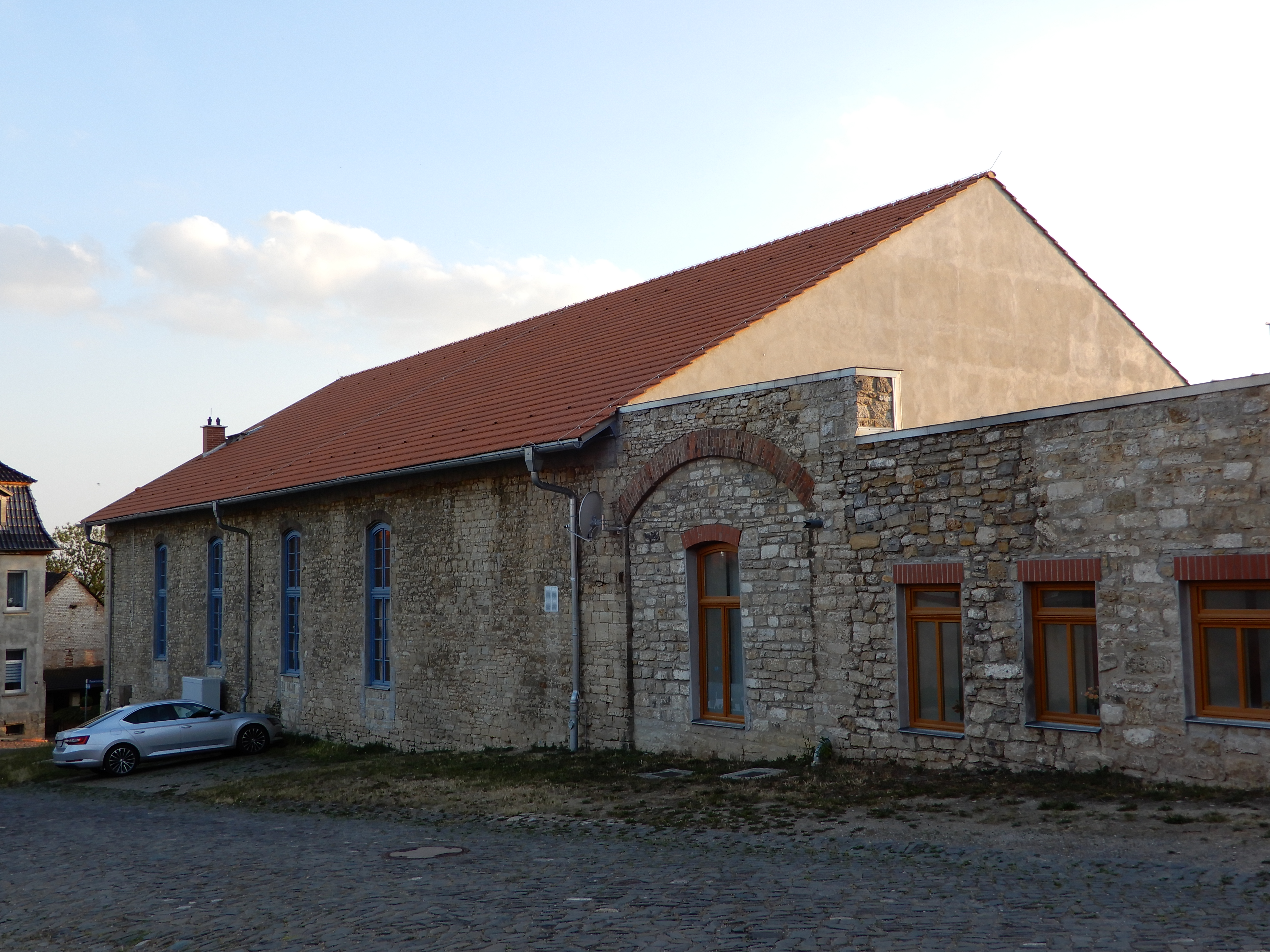 Hof Bäckerstraße 23b (Schadeleben)